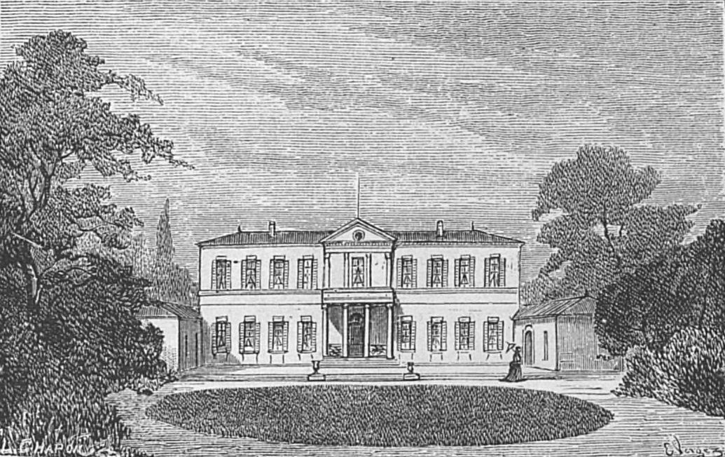 Illustration du Château Branaire-Ducru dans l'ouvrage Bordeaux et ses vins (6ème édition) de Charles Cocks et Edouard Féret publié en 1893